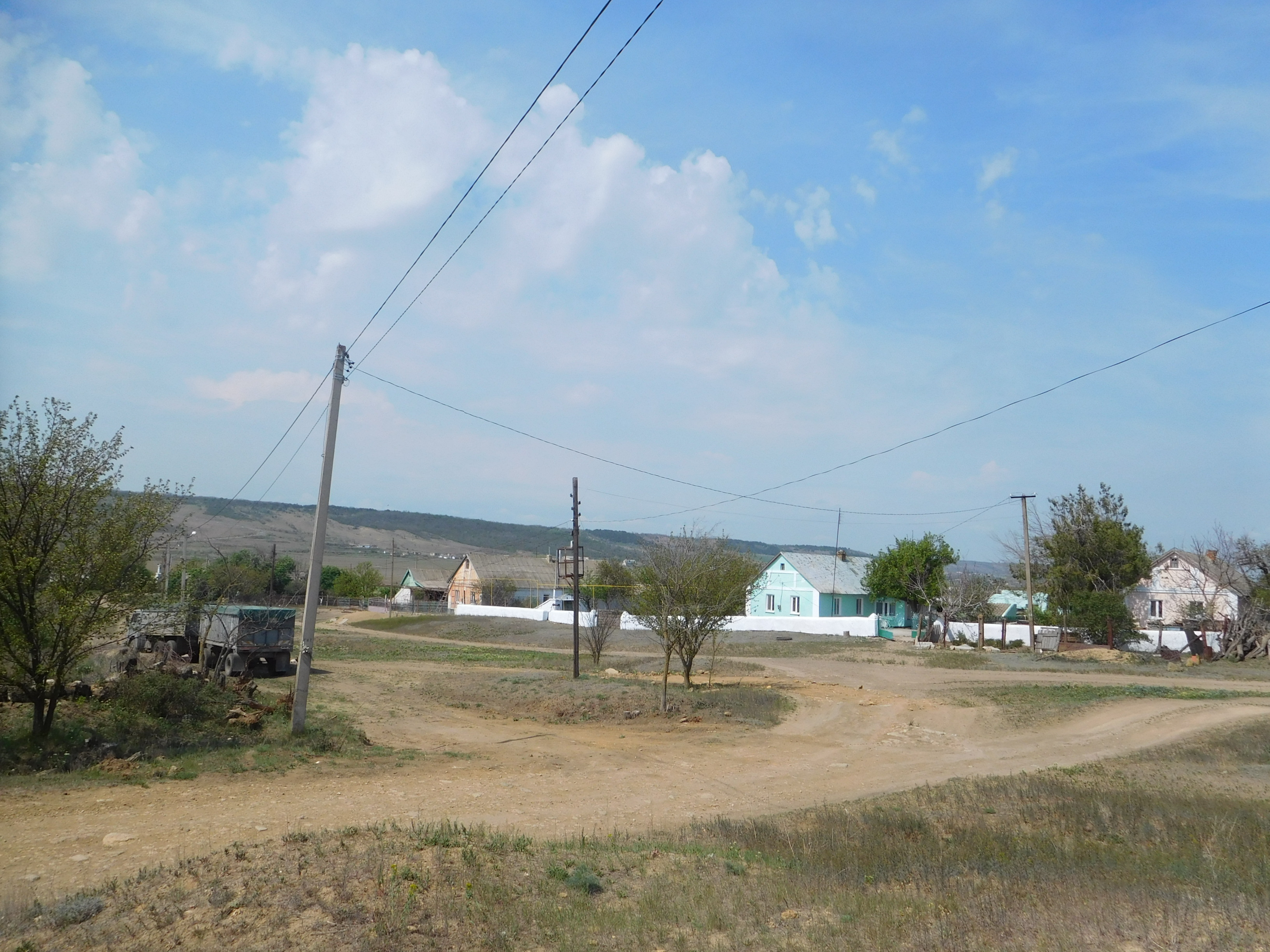 с. Баранове, Одеська область